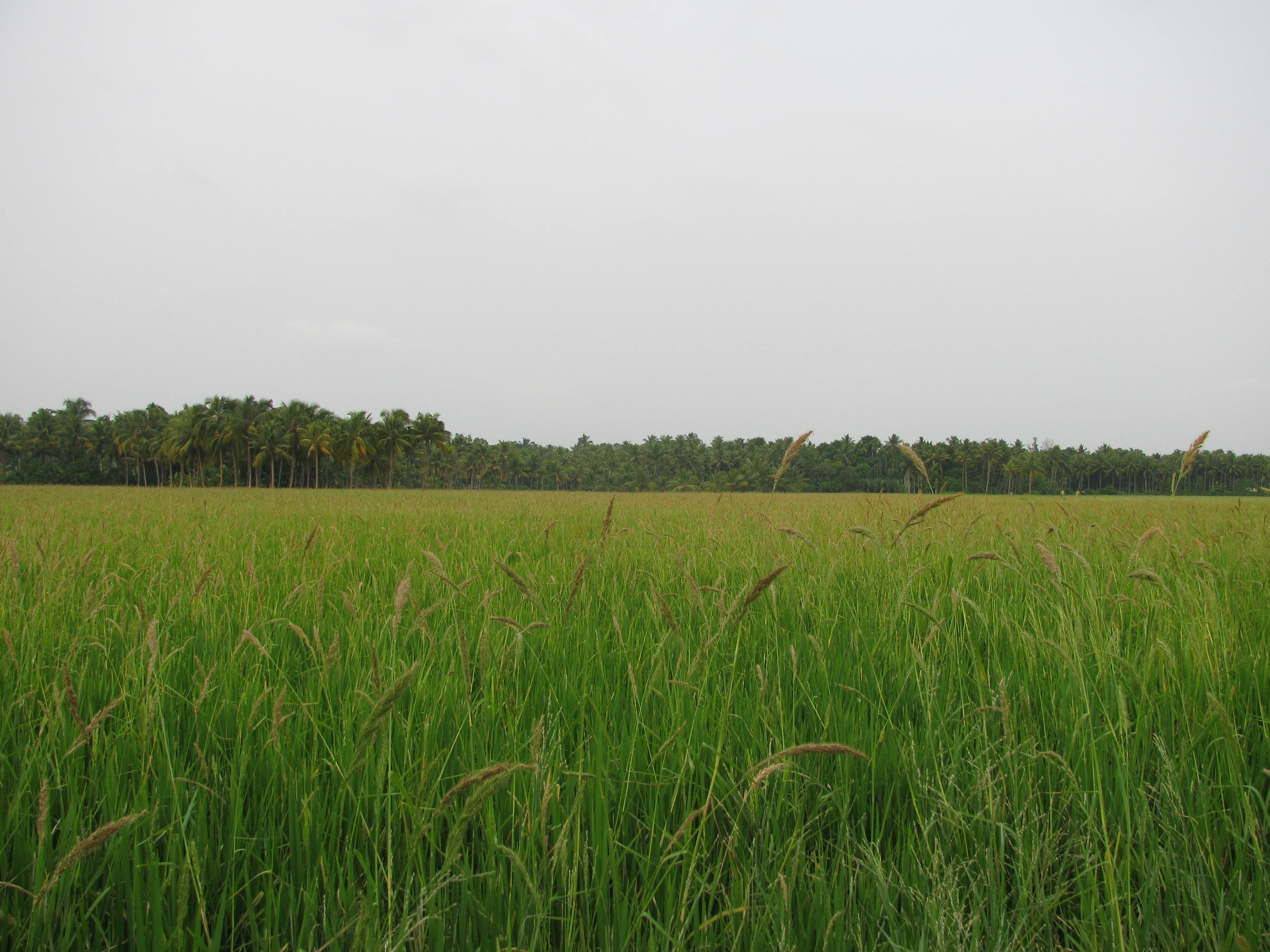 ആലങ്ങാട് ഗ്രാമത്തിലെ ഒരു നെല് പാടം